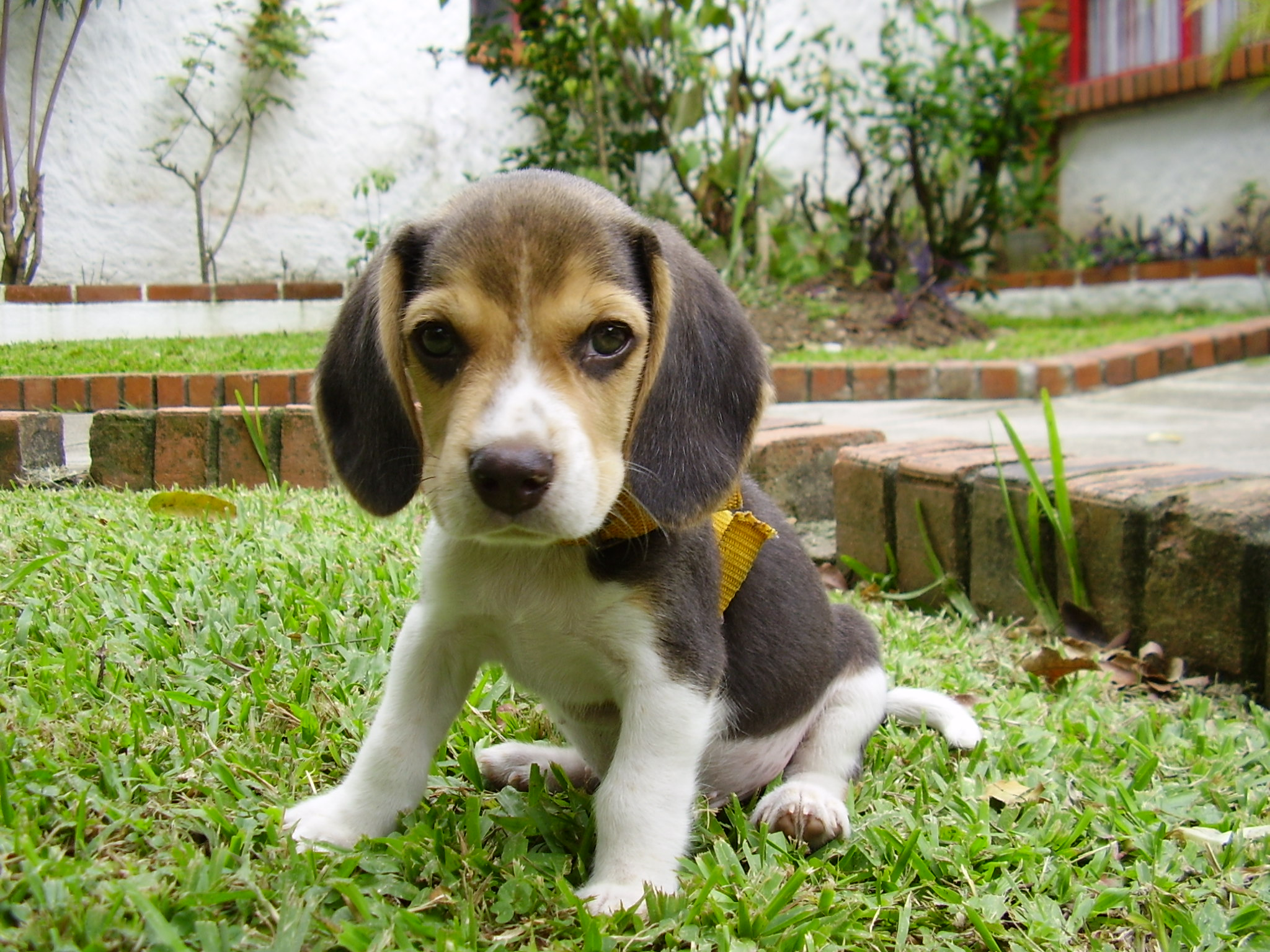 Beagle de 60 días